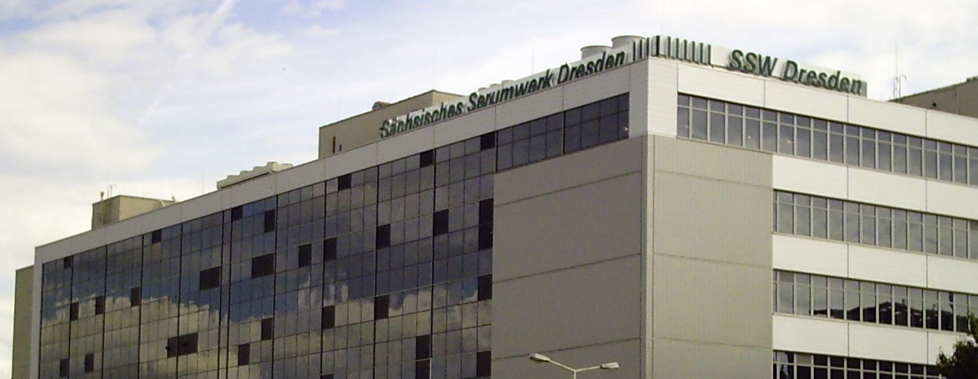 Fassadenansicht des Sächsischen Serumwerks Dresden mit grünem Schriftzug auf dem Dach (Nord-West-Ecke).